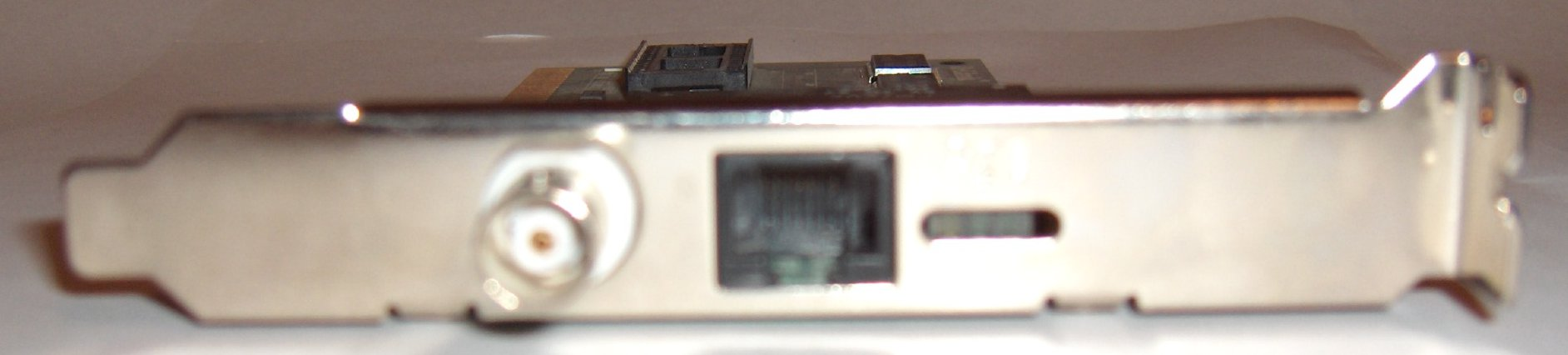 Detalle de los conectores BNC (Coaxial) y RJ45 de una tarjeta de red Foto tomada por Jorge González. Tarjeta de red